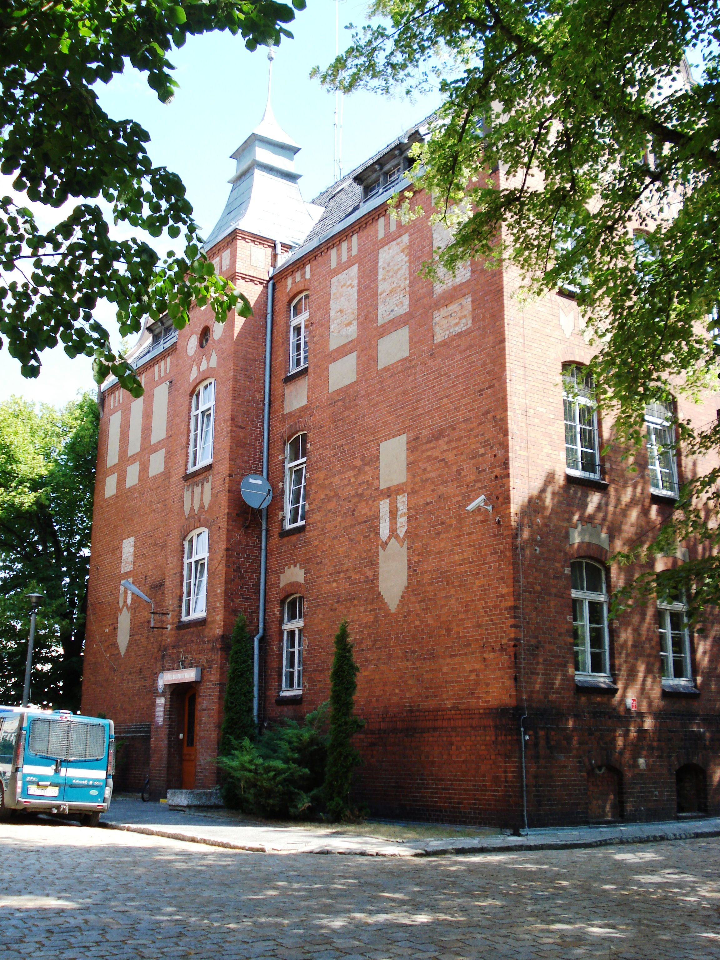 Siedziba Placówki Żandarmerii Wojskowej w Lesznie.